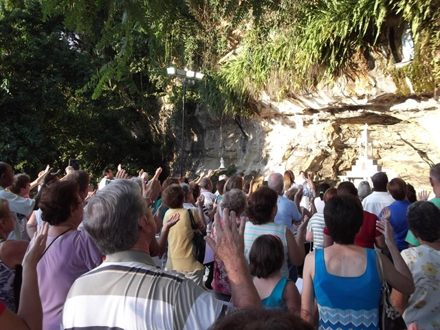 Missa realizada no Parque das Monções, missa a Nossa Senhora da Penha, na gruta réplica da original de Lourdes/França